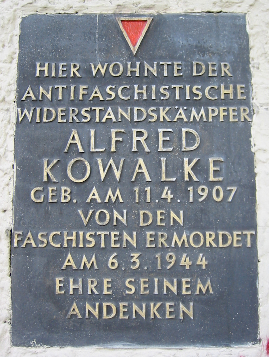 Alfred Kowalke memorial, Boxhagener Straße 51